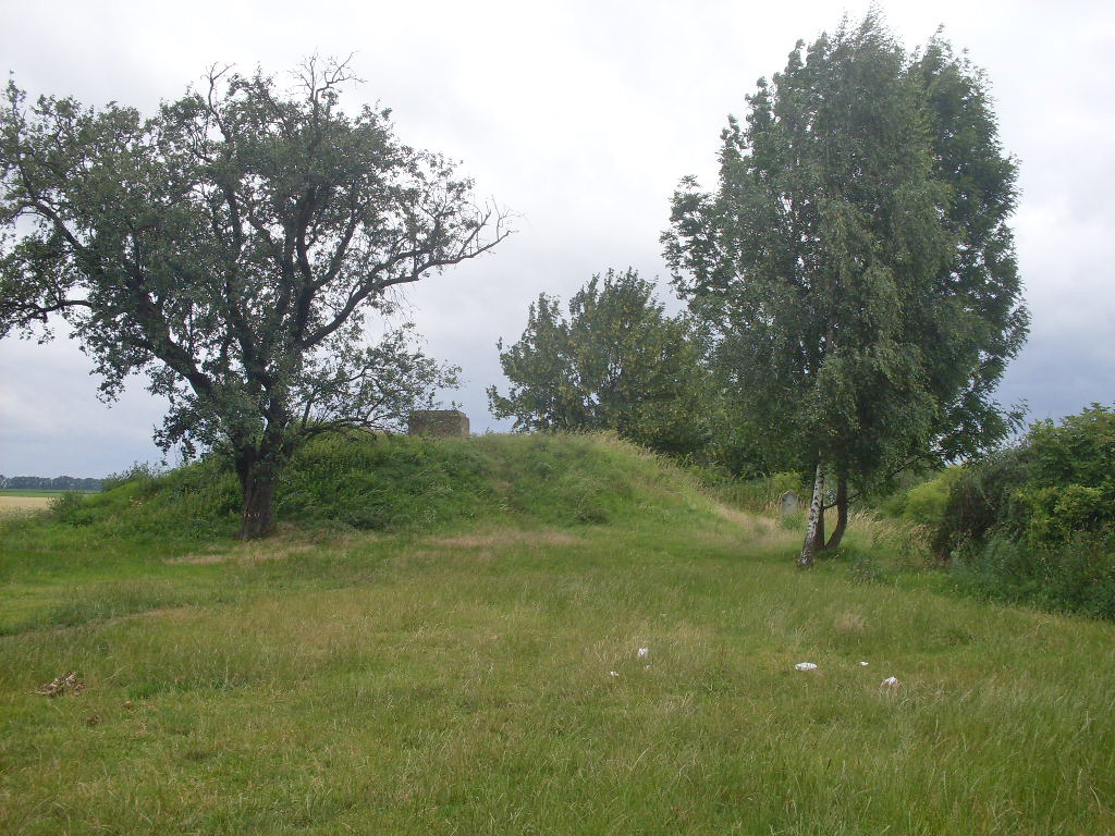 Monarchenhügel bei Großgörschen Zustand im Juli 2011